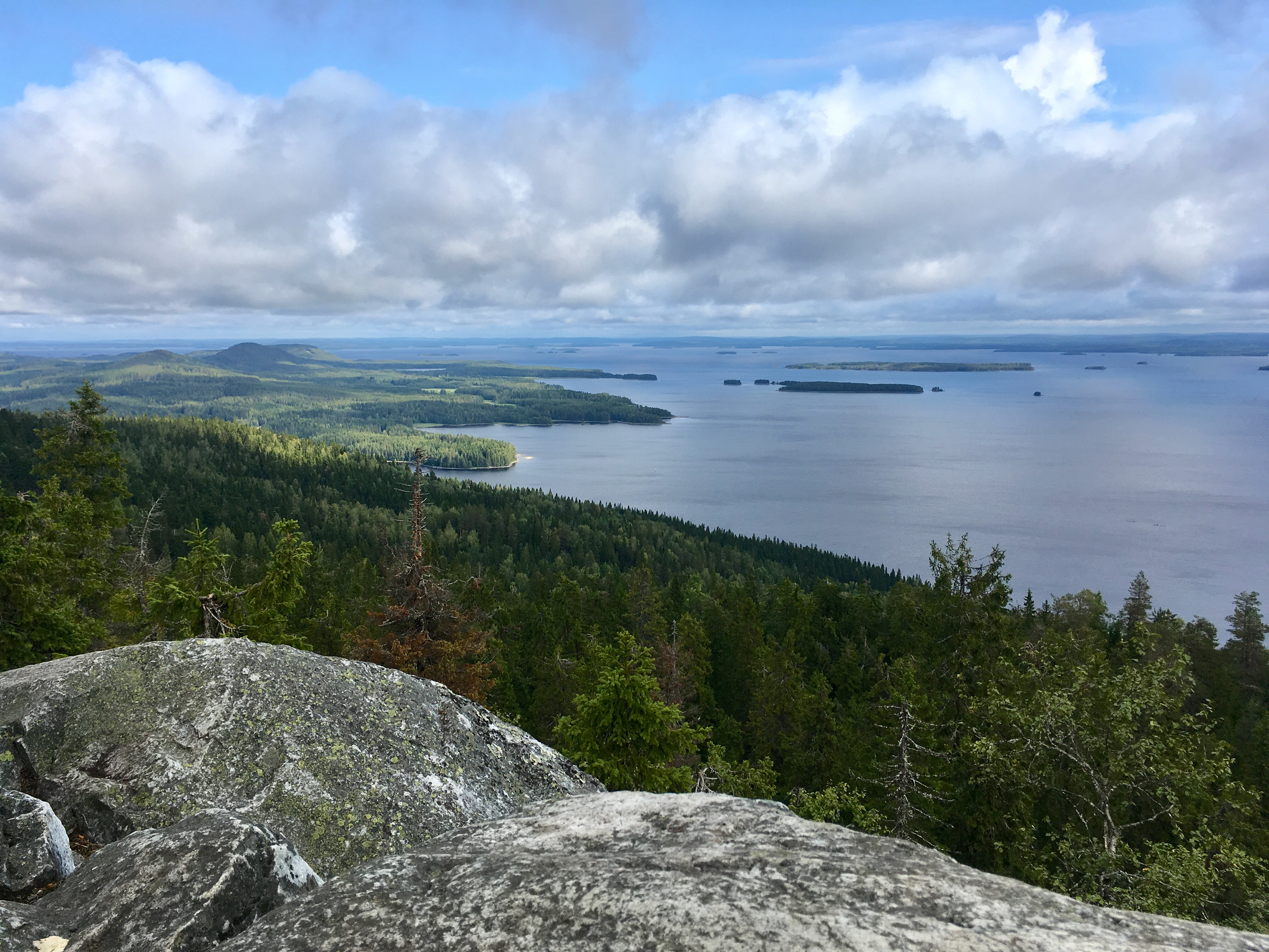 Koli